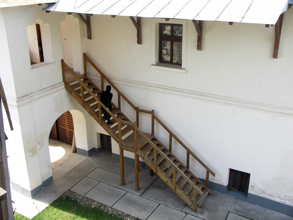 Mănăstirea Gura Motrului. Scara la foişorul mănăstirii. 02